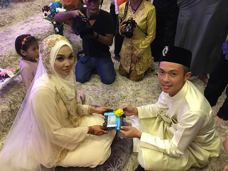 See Kok Luen @ Adam semasa perkahwinannya dengan Norfajrina Idris.